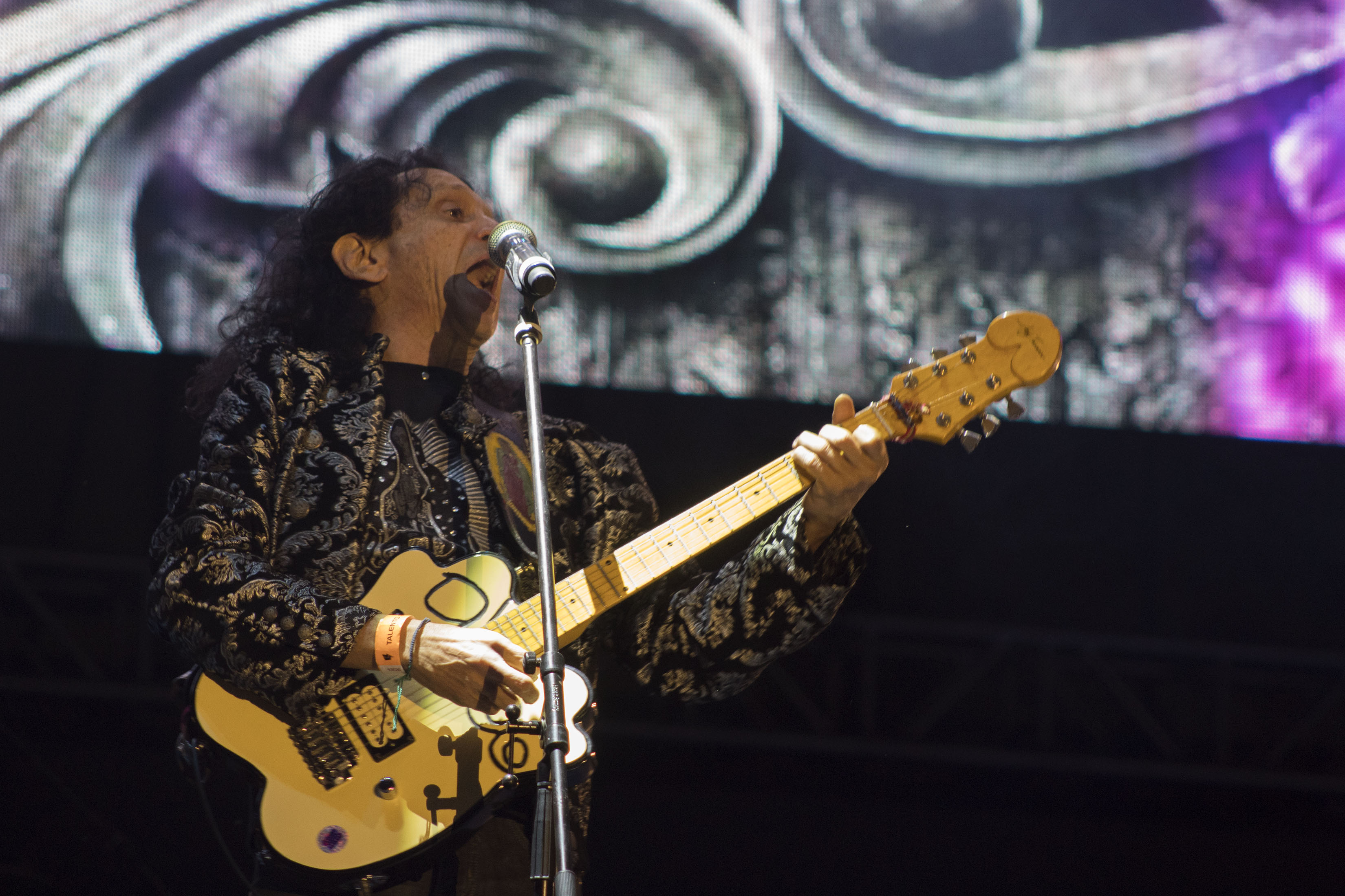 Sábado 12 de noviembre de 2017. Como parte de las actividades de la Semana de las Juventudes del 2017, este sábado 12 de noviembre se desarrolló un segundo concierto masivo en la plancha del Zócalo capitalino. Las bandas que se presentaron en esta ocasión fueron: Marcelo Viejo, Charlie Rodd, Ely Guerra, Dorian, Chetes, La Gusana Ciega, División Minúscula, El Tri y Fatboy Slim. Fotografía: Carlos Luna / Secretaría de Cultura CDMX